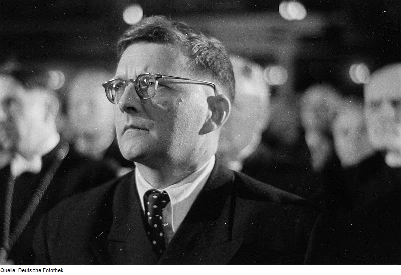 Original image description from the Deutsche Fotothek Portrait Dmitri Dmitrijewitsch Schostakowitchs im Publikum der Bachfeier